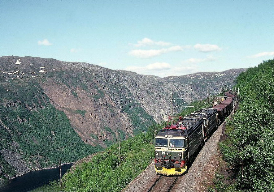 Malmtog trukket av to stk. El 15 ca. ved banens km 25 mellom Katterat og Rombak.